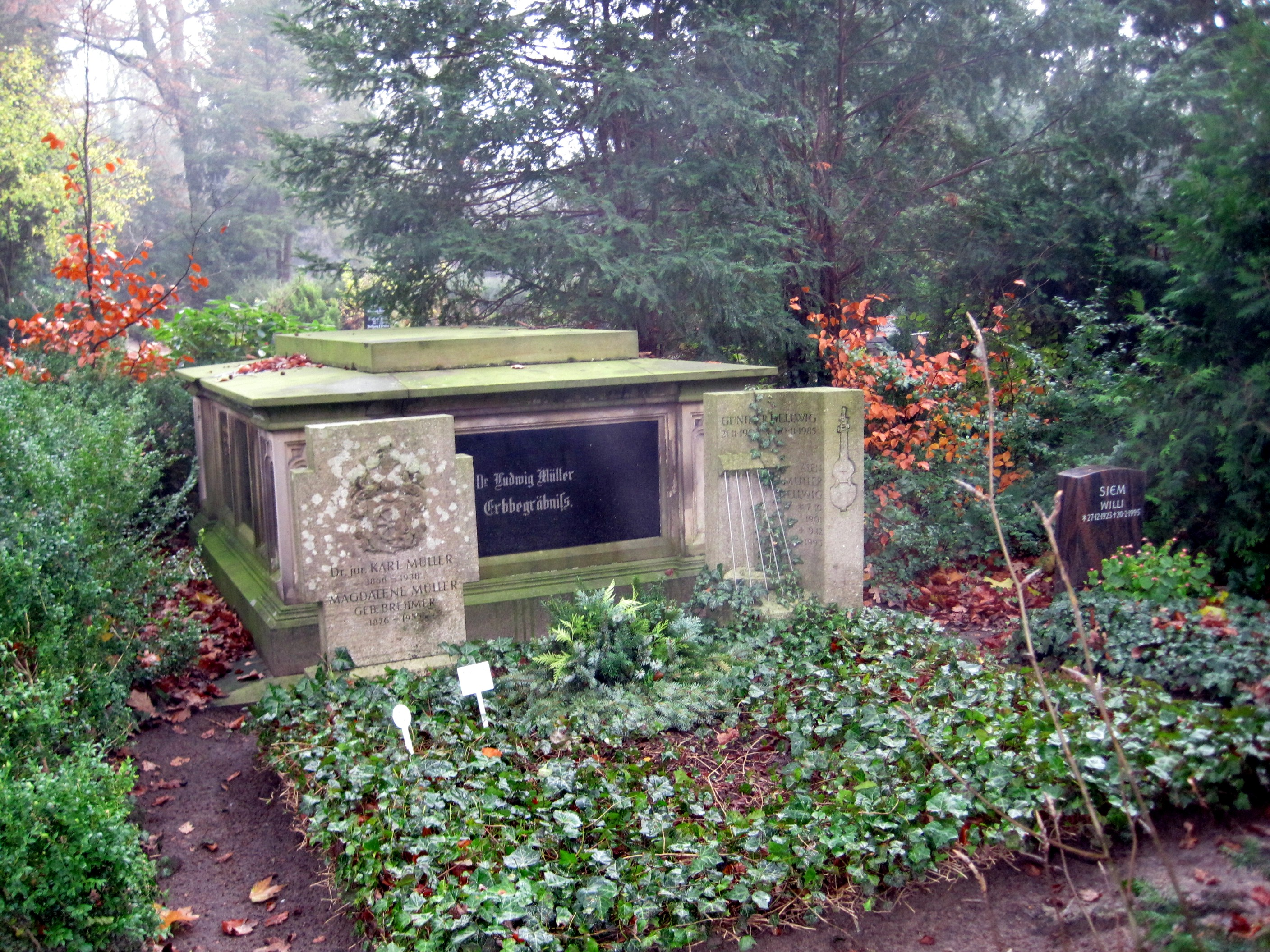 Erbbegräbnis der Familie des Lübecker Senators Ludwig Müller (1782-1865) auf dem Burgtorfriedhof.